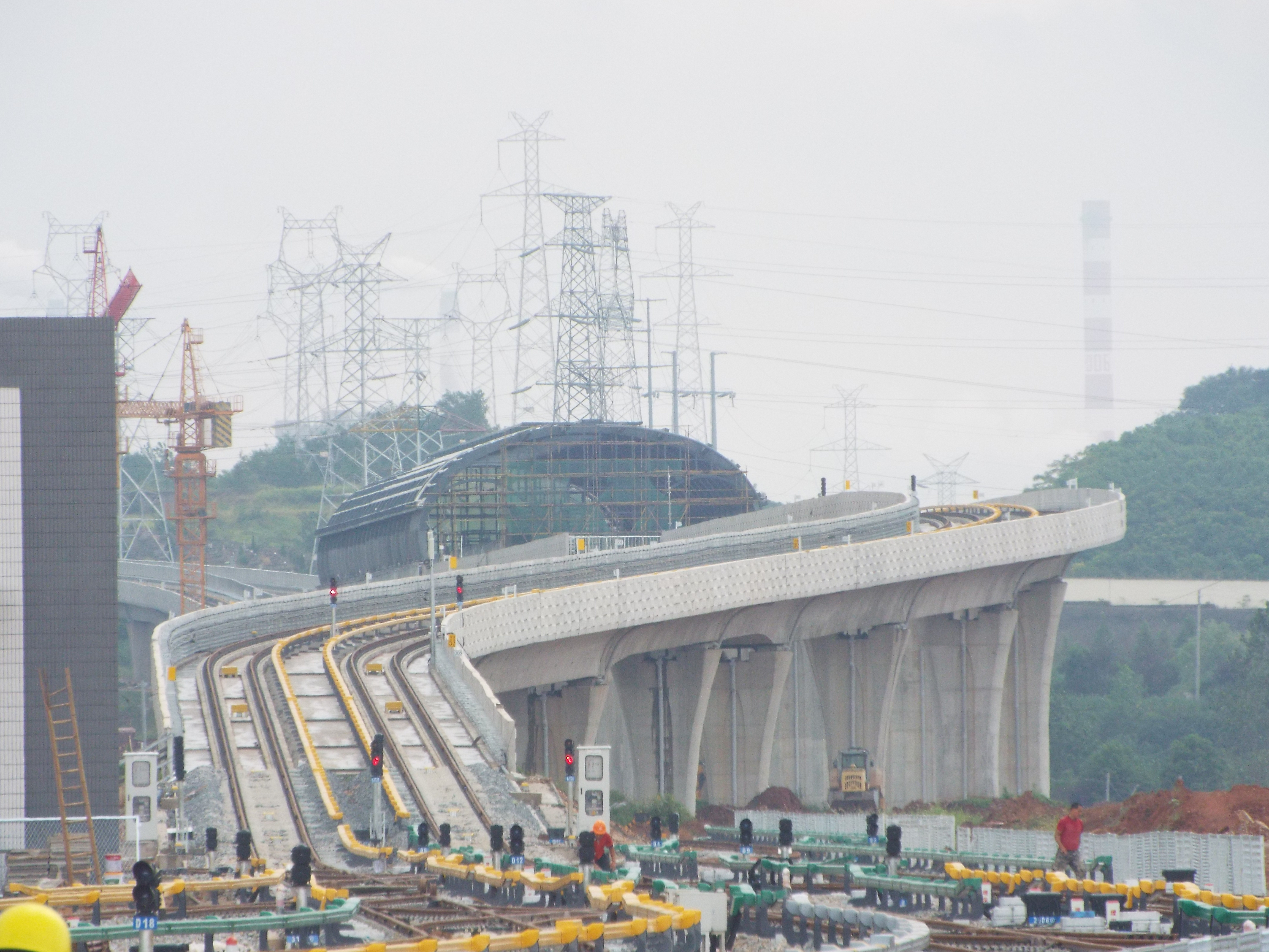 中文（中国大陆）: Daoshuihe Depot